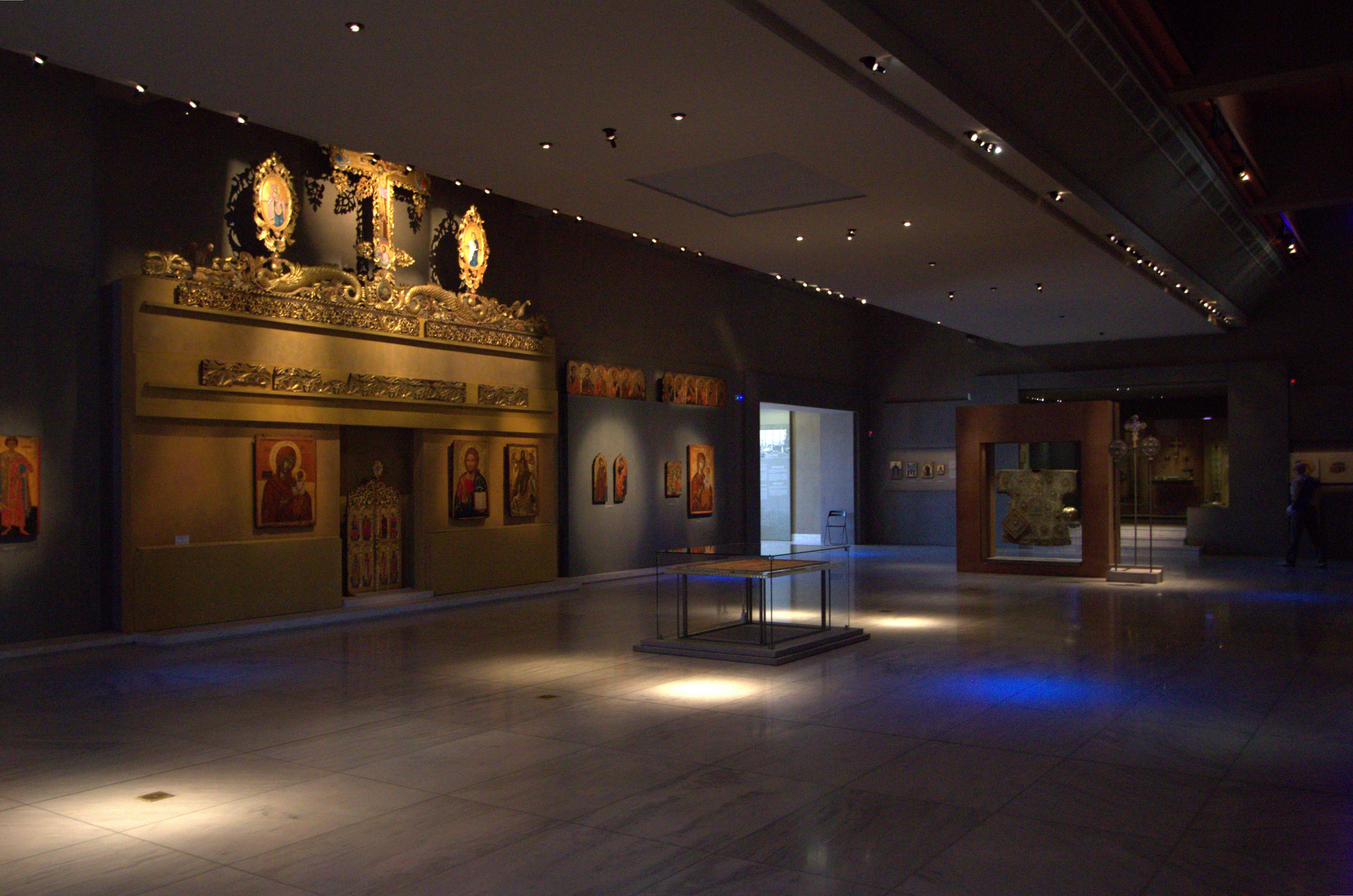 Μουσείο Βυζαντινού Πολιτισμού, Θεσσαλονίκη.